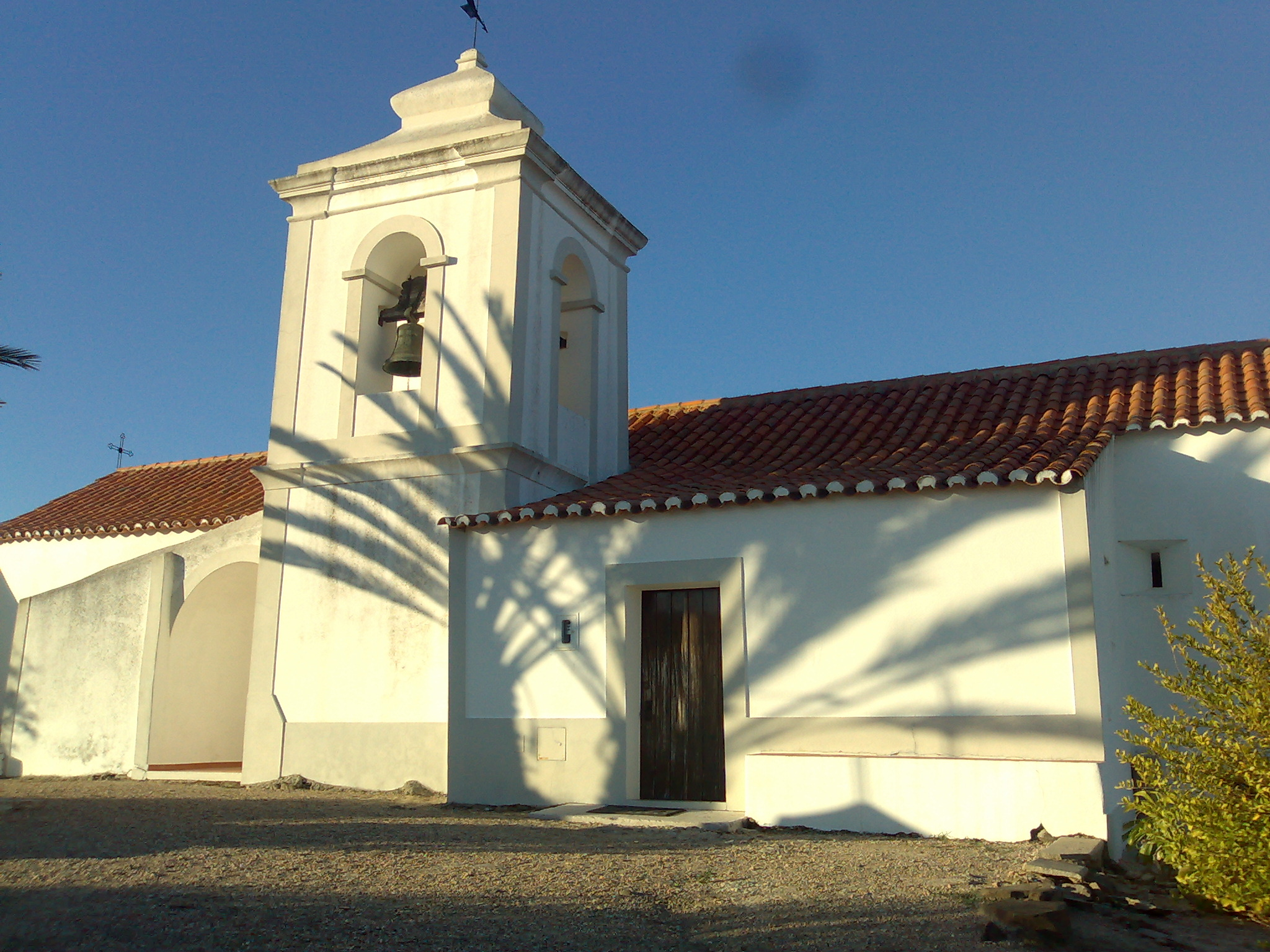 Church in São Bartolomeu da Serra, Portugal